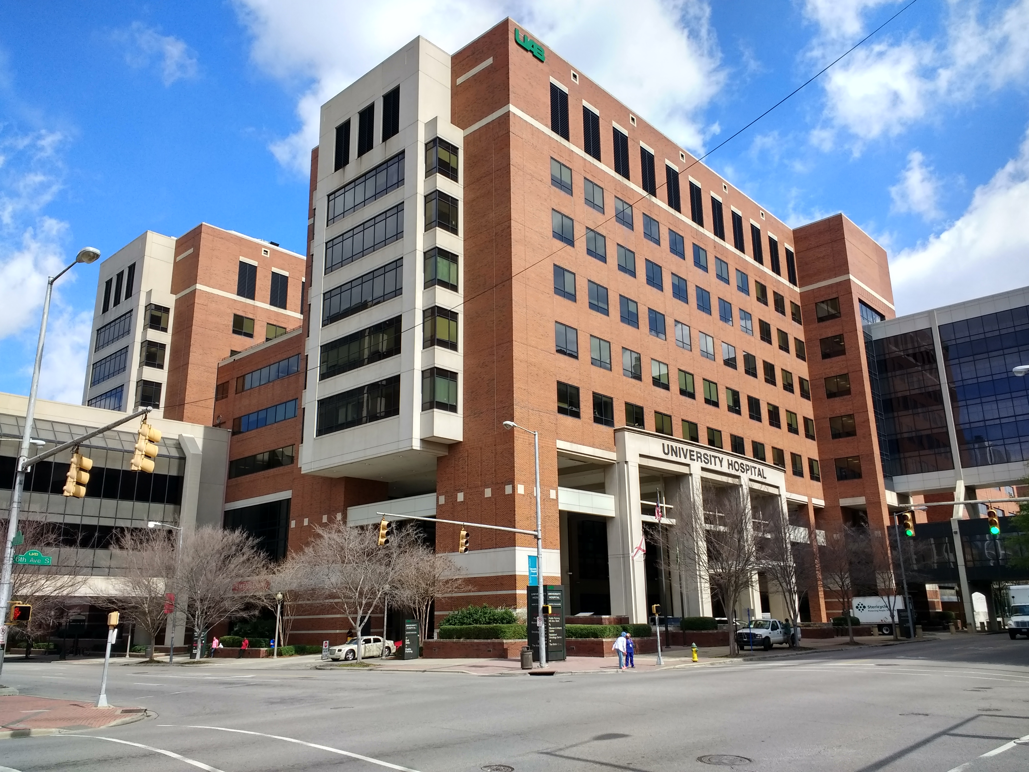 UAB Hospital.